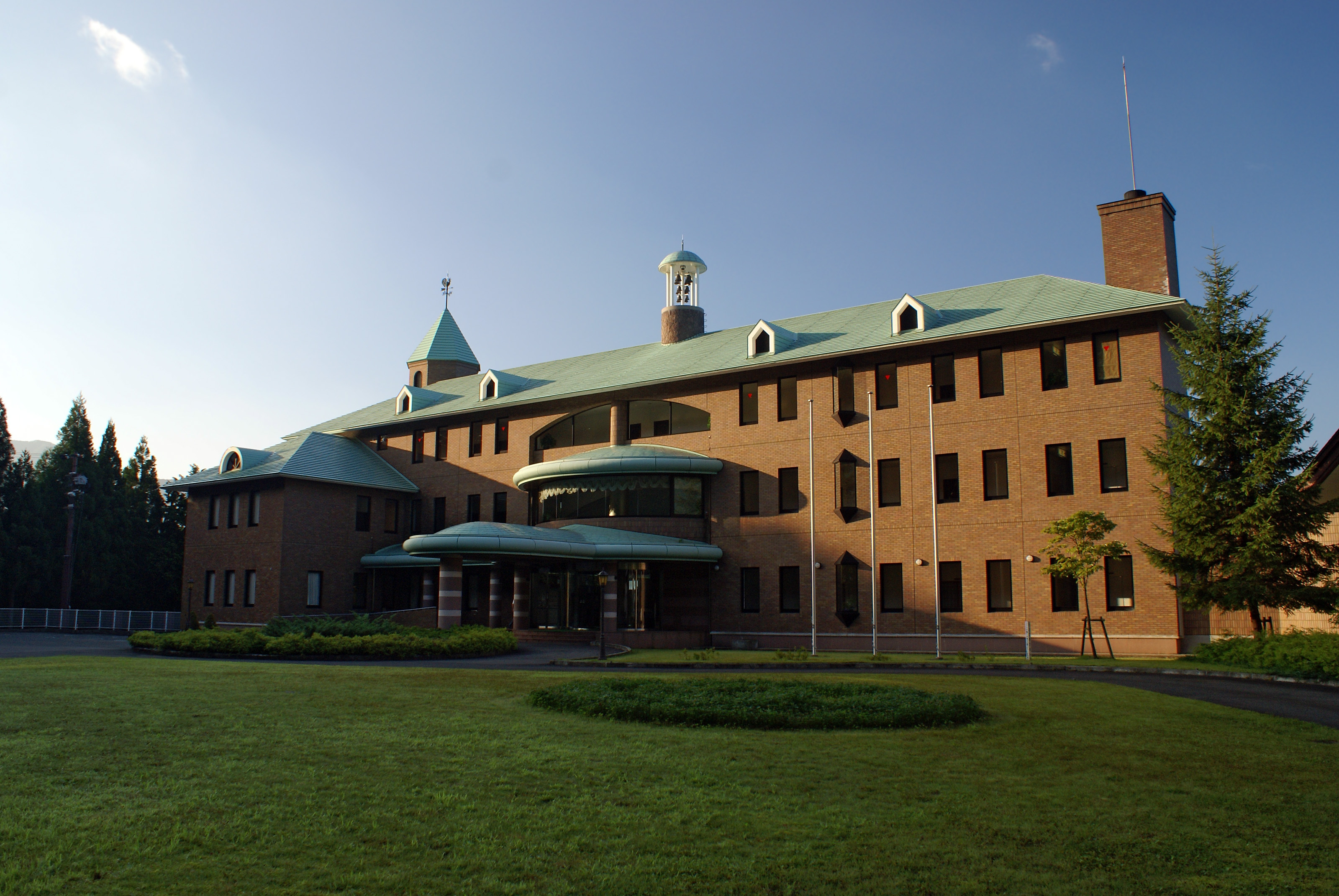 Lodge Kadoma in Torokawadaira, Kami, Hyogo, Japan